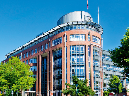 Zentrale der HEK - Hanseatische Krankenkasse